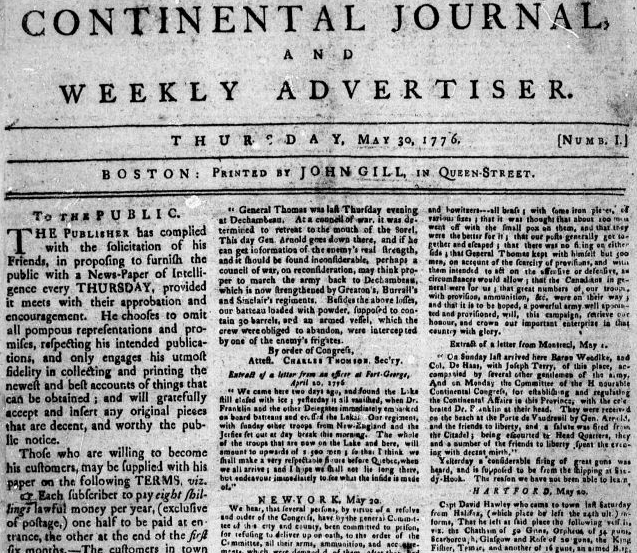 From: Continental Journal, no.1 (Boston: J. Gill)